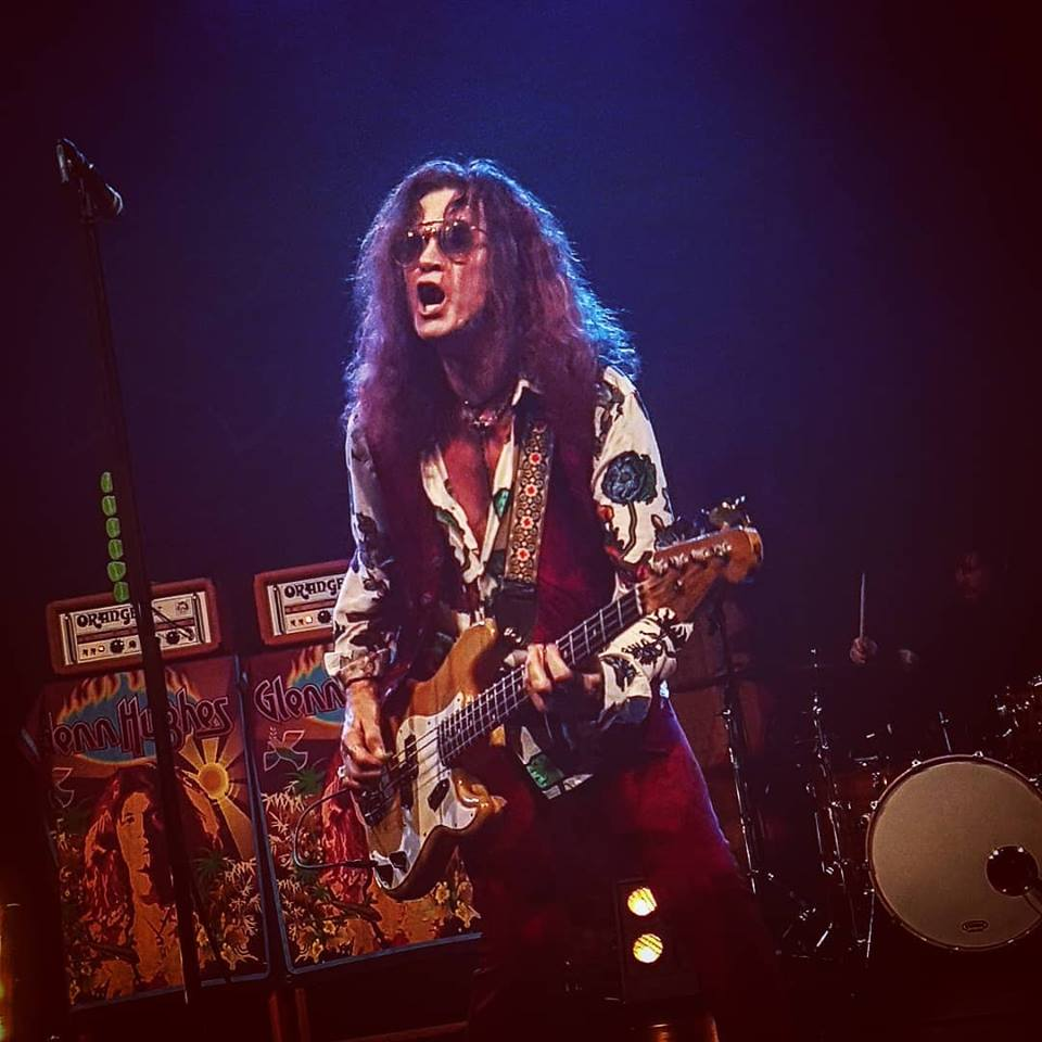 Glenn Hughes à l'Elysée Montmartre (Paris) le 6 novembre 2018.